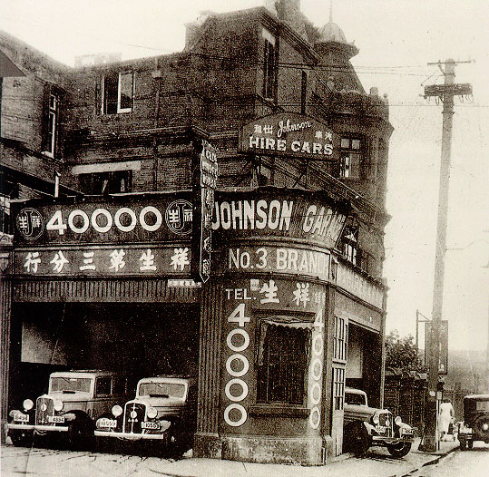 祥生出租的第三分行